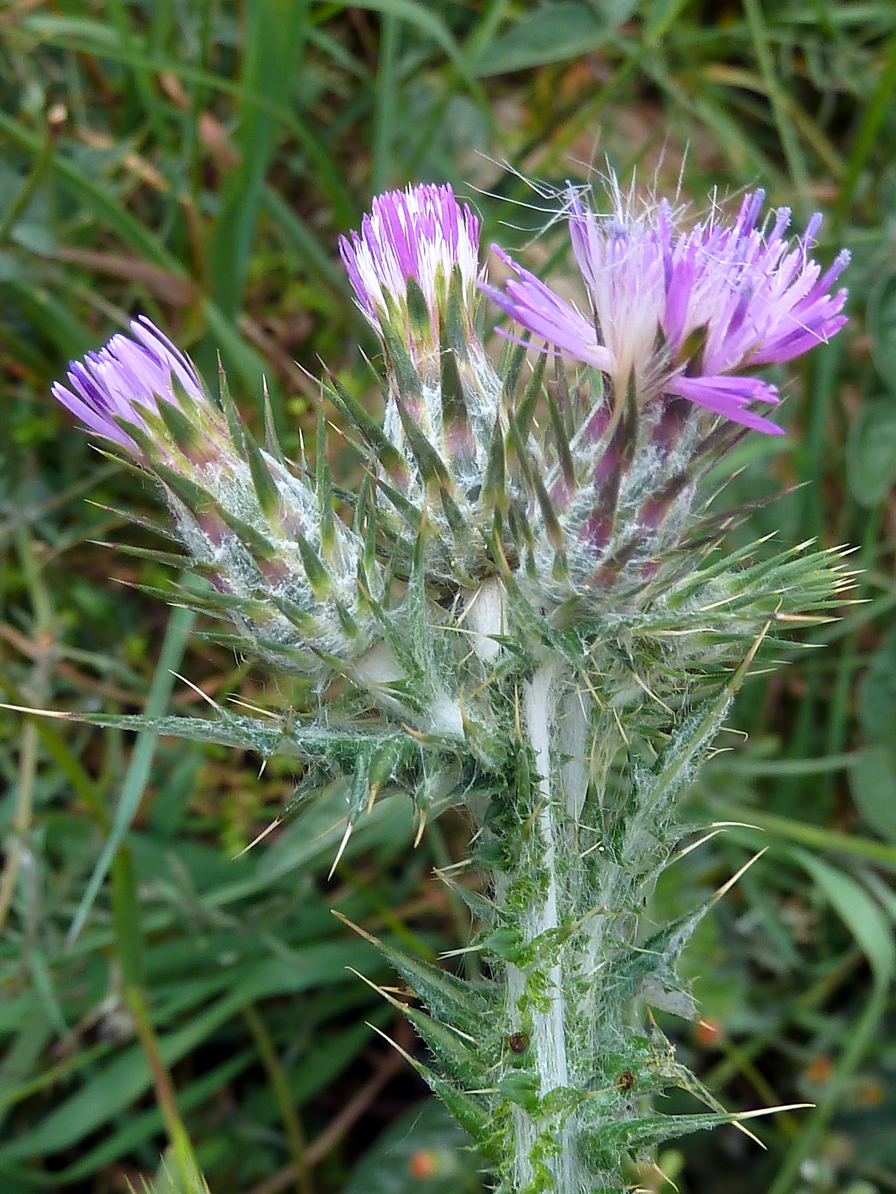 Carduus pycnocephalus (Cardo, cardo borriquero, cardo negro) - Inflorescencia con capítulos en diversos estados de desarrollo. Colonia Ilicitana, Albatera (Provincia de Alicante, España).